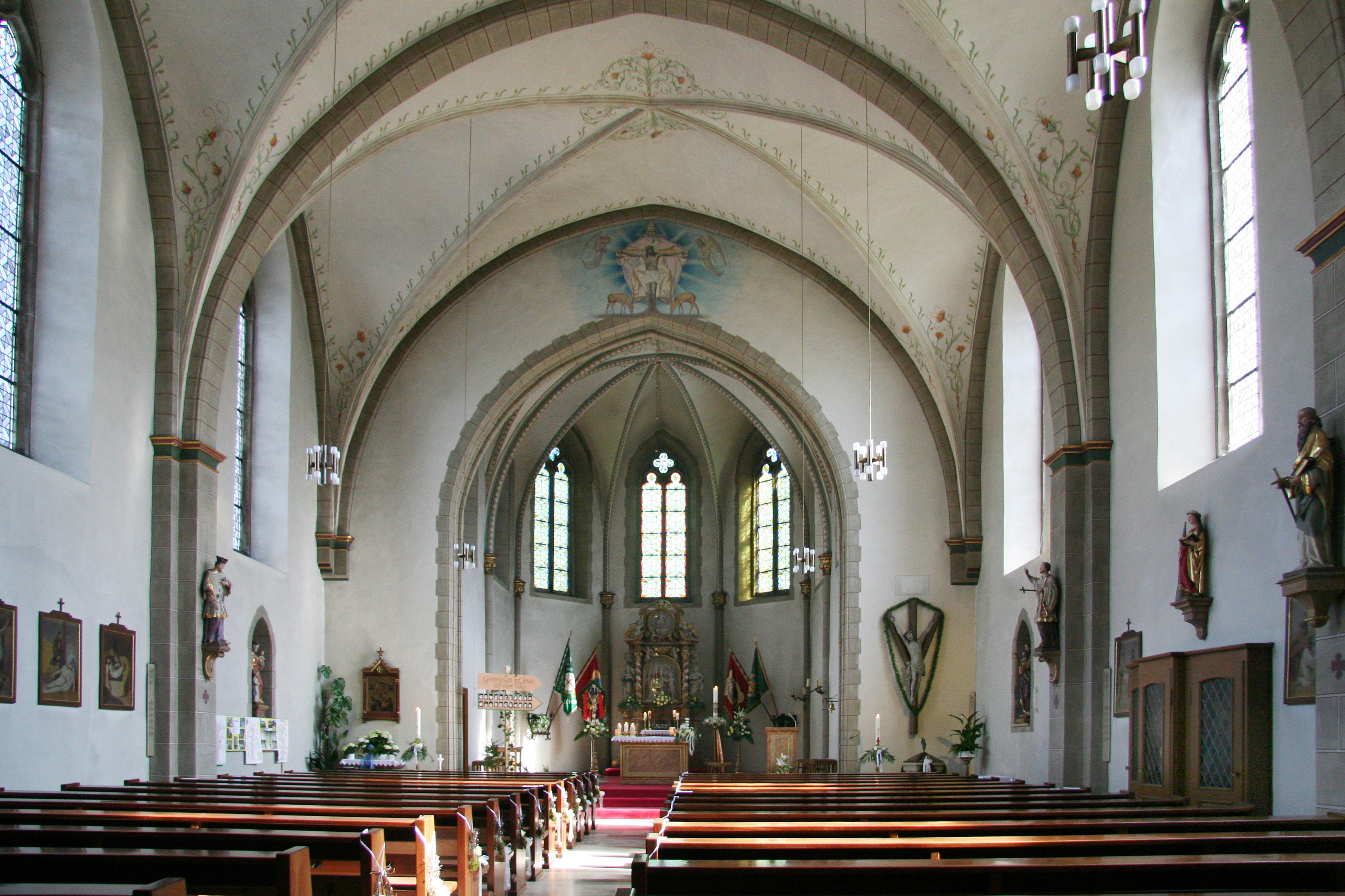 Innenraum der Pfarrkirche St. Johannes Baptist in Züschen